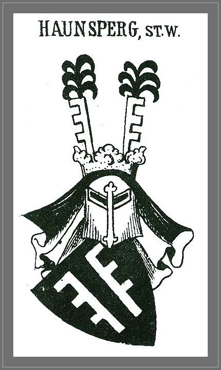 Stammwappen der Haunsperger